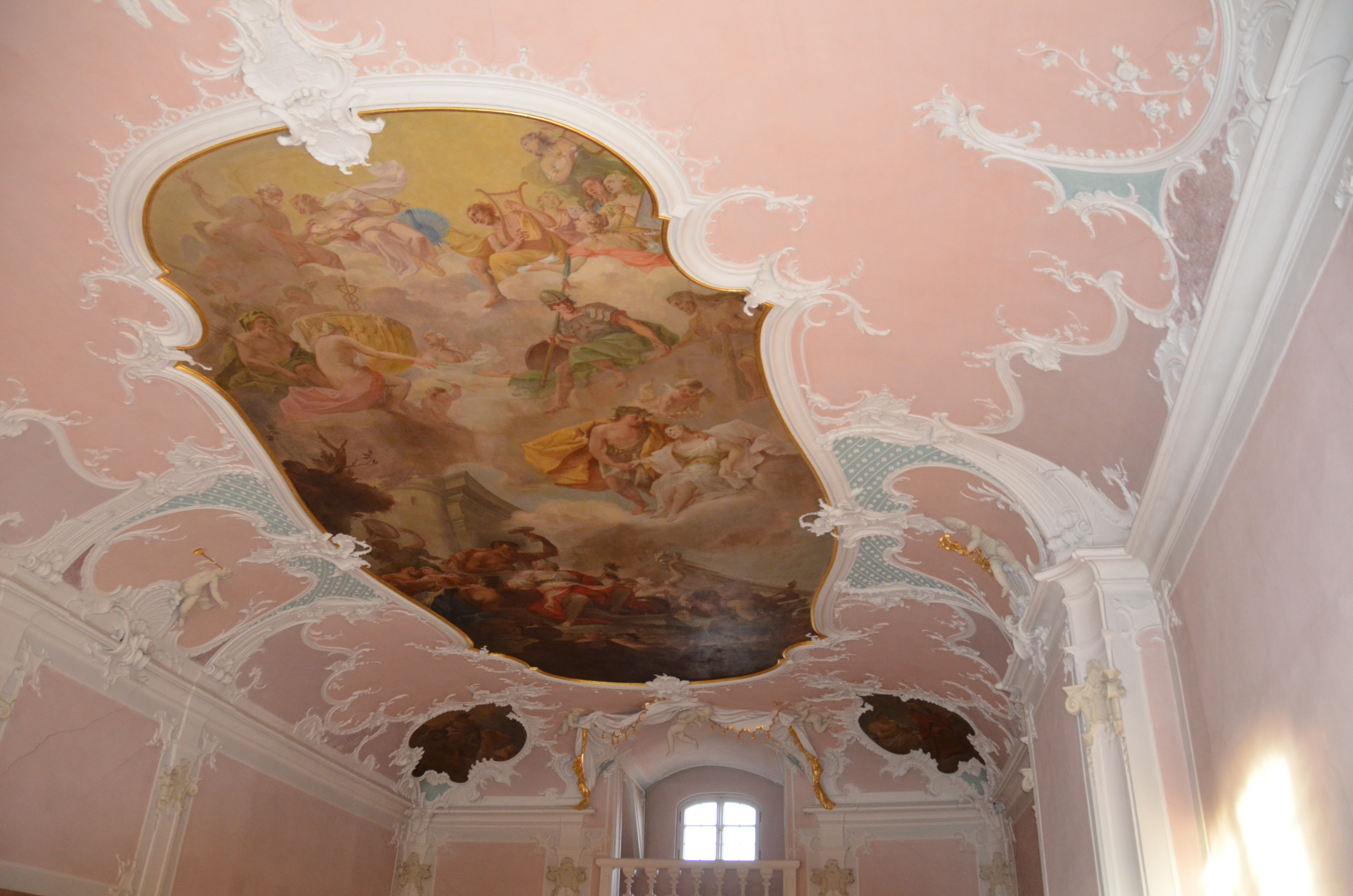 Der Festsaal im Ponikauhaus